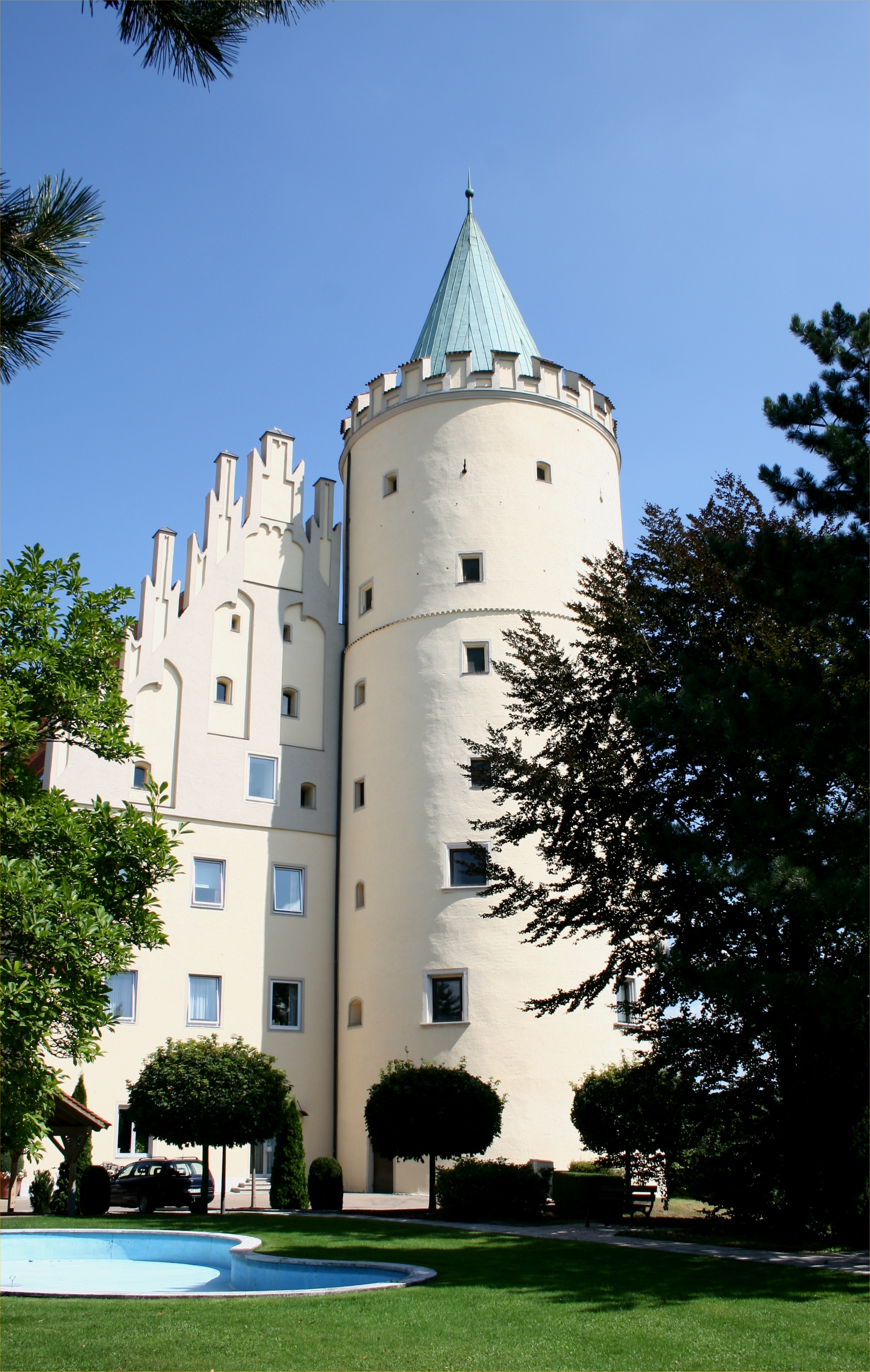 Im ehemaligen Schloss in Lauingen, Landkreis Dillingen, befindet sich heute ein Pflegezentrum